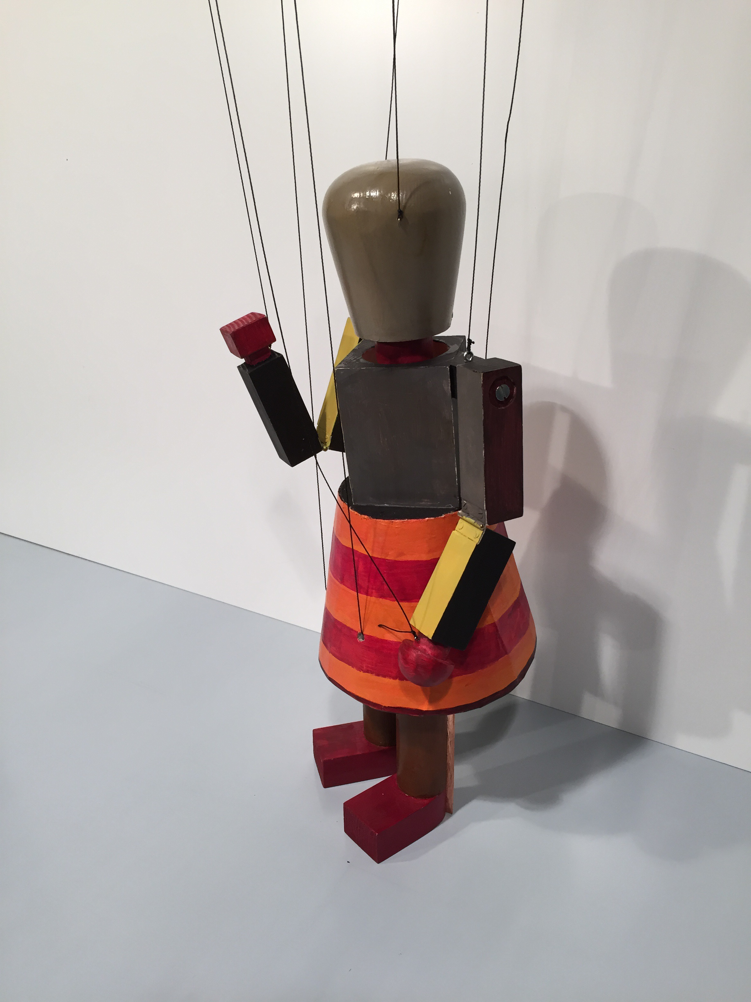 Nachbau (2015) der am Bauhaus gefertigten Marionette "Der Ölhändler". Original Gestaltung von Kurt Schmidt, Ausführung von Toni Hergt, 1923. Ansicht von der Seite.